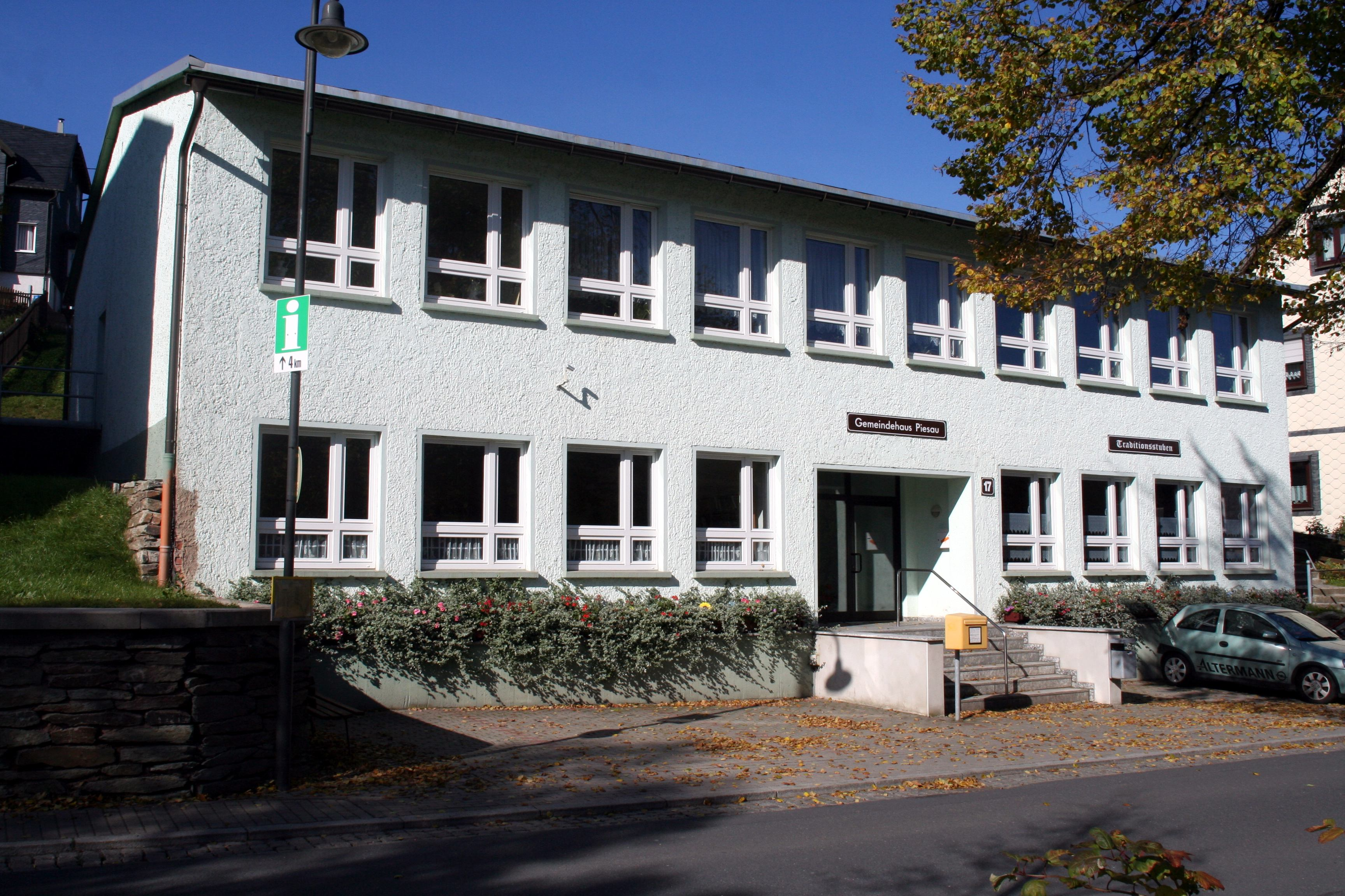 Gemeindehaus Piesau in Südthüringen